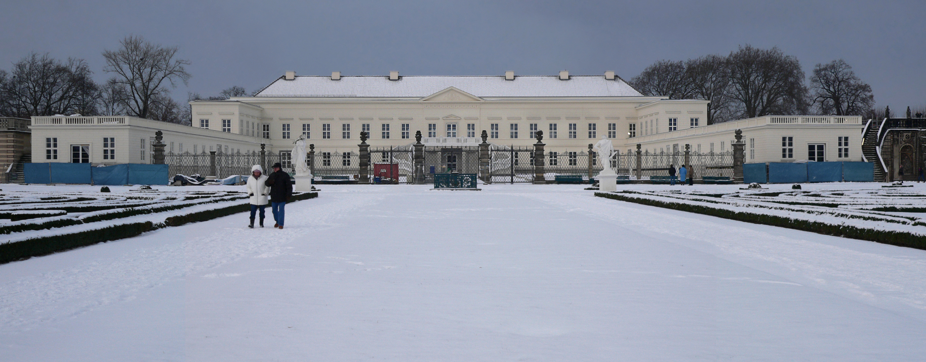 Schloss Herrenhausen (von der Gartenseite aus, perspektivisch verzerrt)